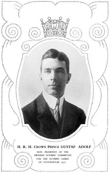 Prince Gustaf Adolf, Président du Comité Olympique Suédois en 1912.